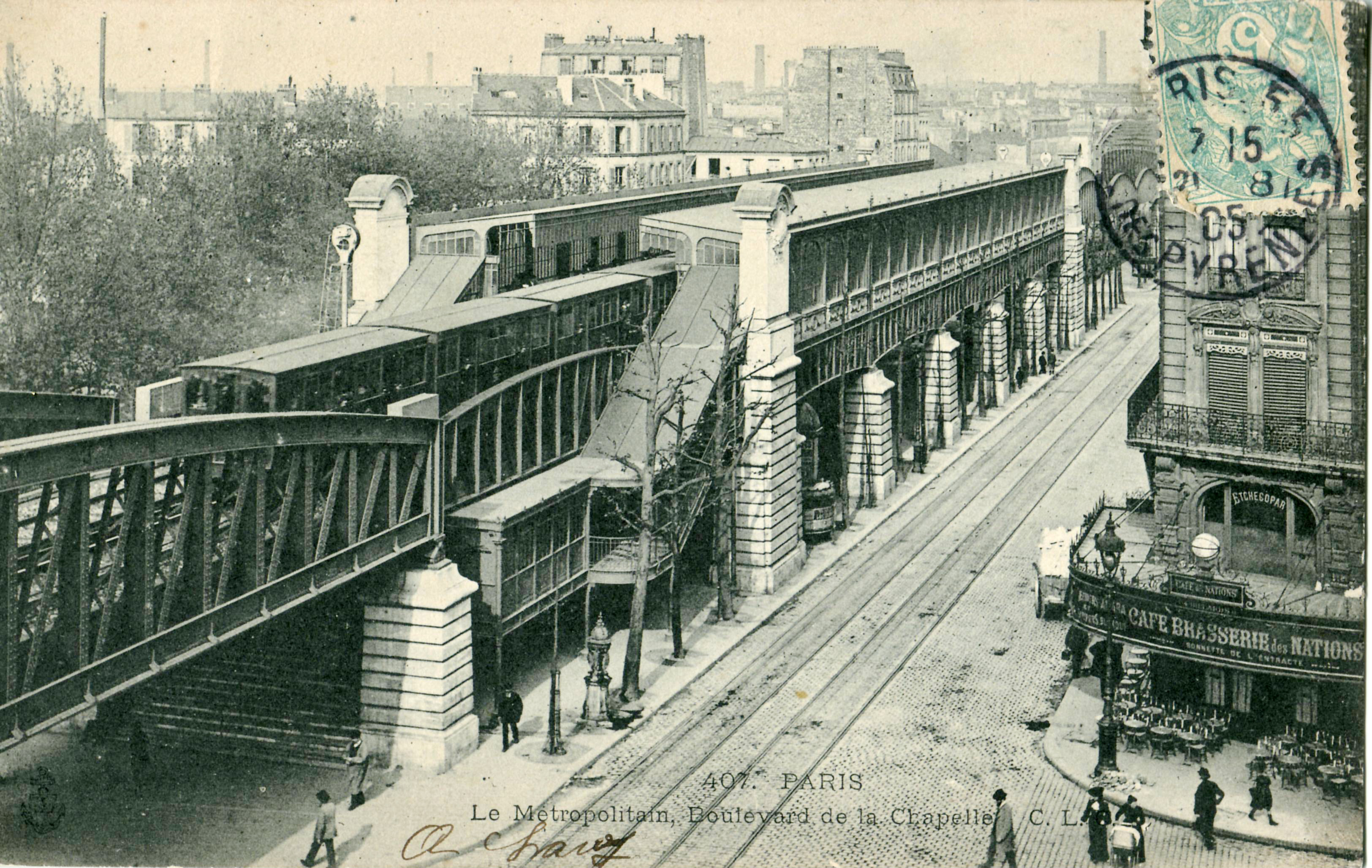 Carte postale ancienne éditée par CLC, n°407 :PARIS - Le Métropolitain, Boulevard de la Chapelle